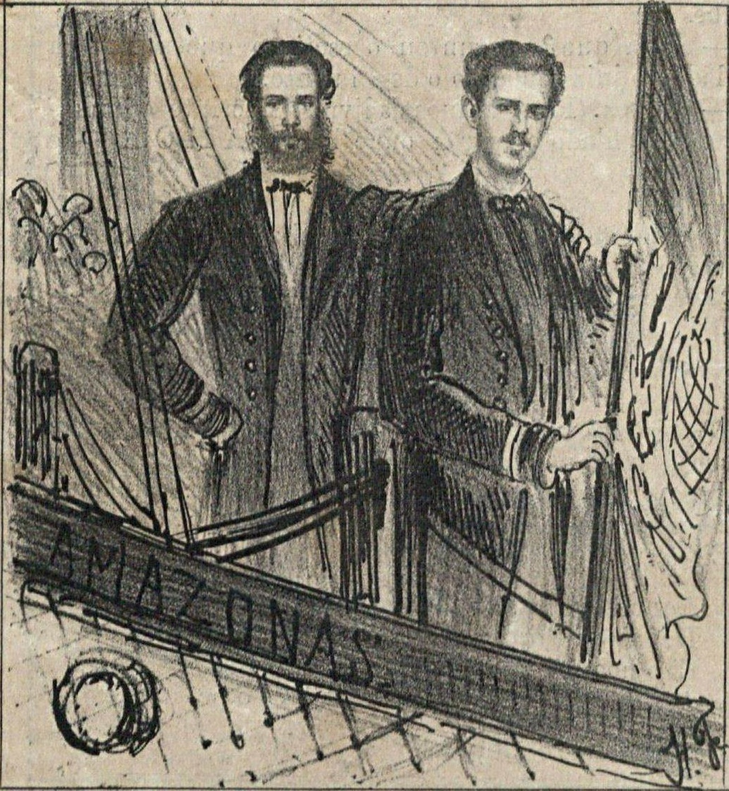 O 1º Tenente Carlos Frederico de Noronha e o 2º Tenente Julio Cesar de Noronha.